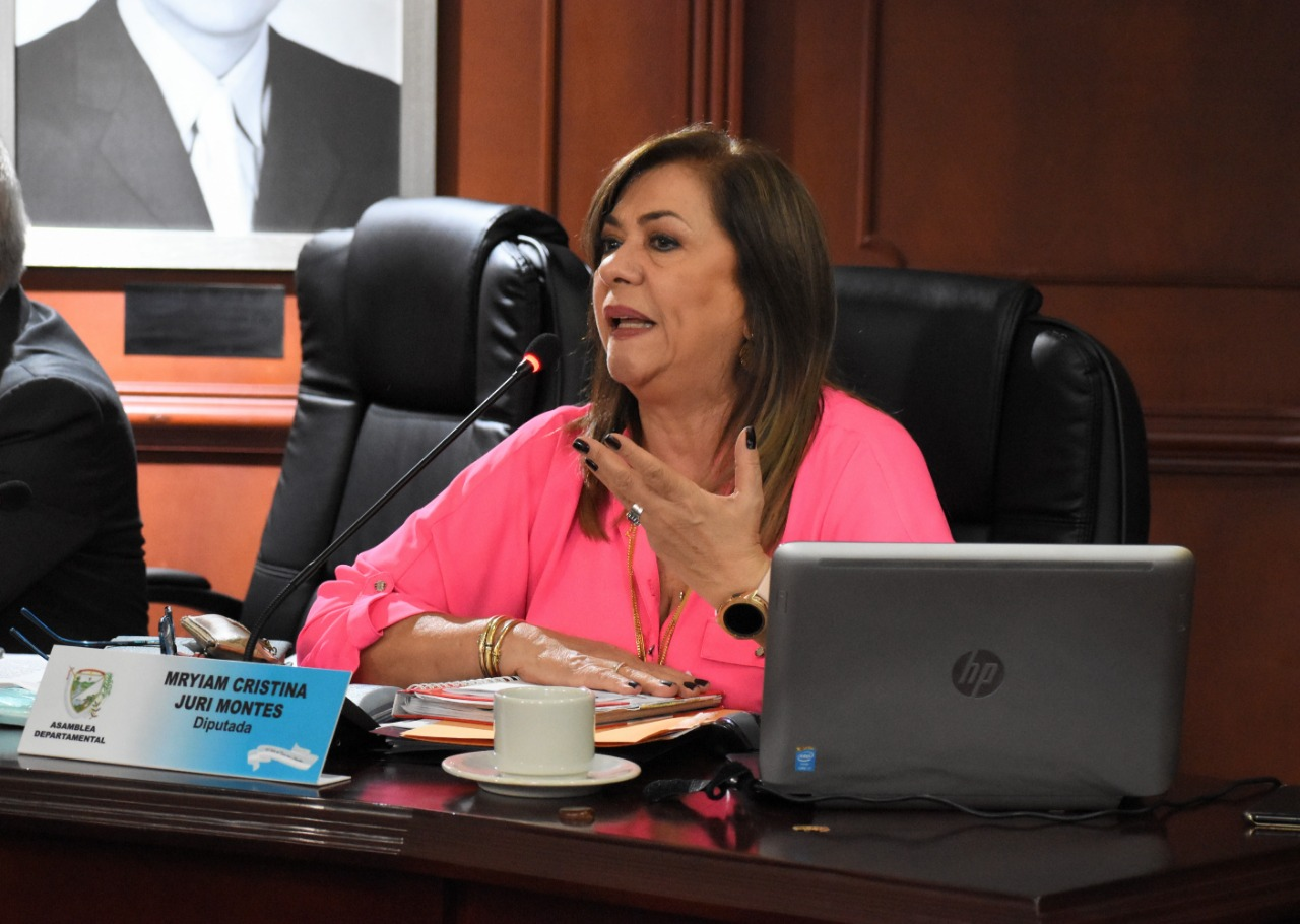 Añade una explicación de una línea de lo que representa este archivo, que incluya solo la información más relevante.